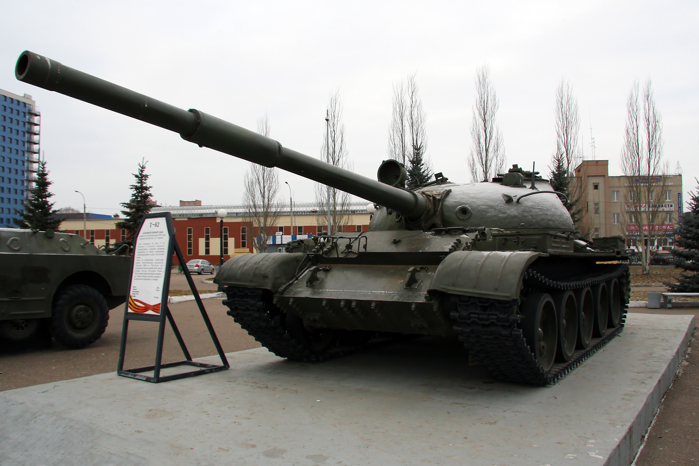 T-62